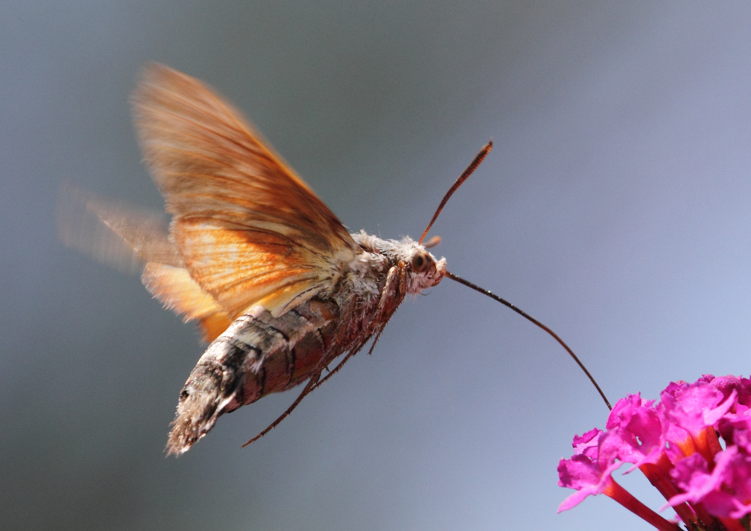 Ein Taubenschwänzchen im Schlosspark Schönbrunn.